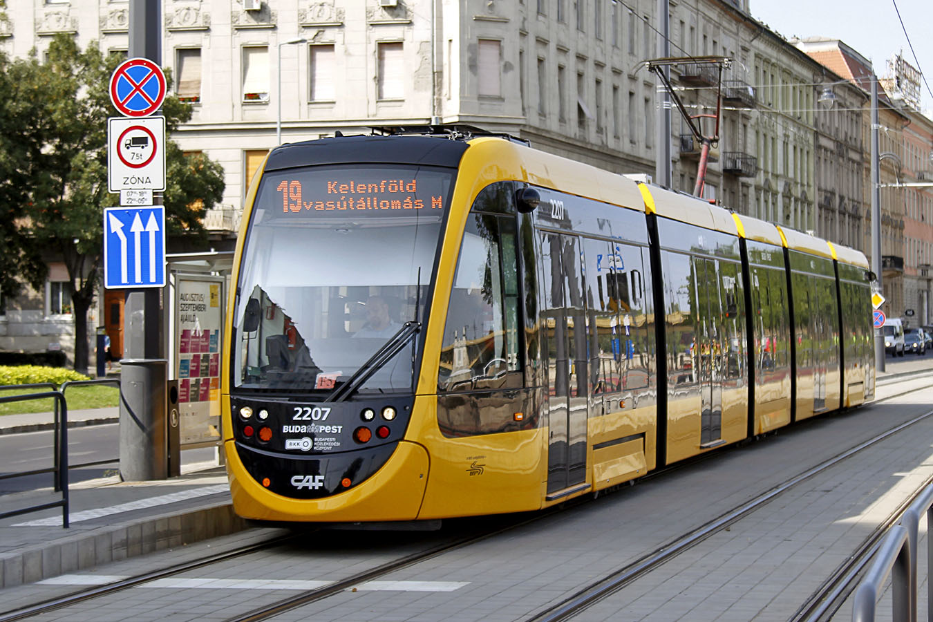 CAF Urbos 3 típusú villamos a 19-es vonalon Krisztinaváros, Krisztina körút és Orvos lépcső sarok közelében